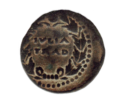 As de Iulia Traducta Fotografía de realización propia, mayo de 2007